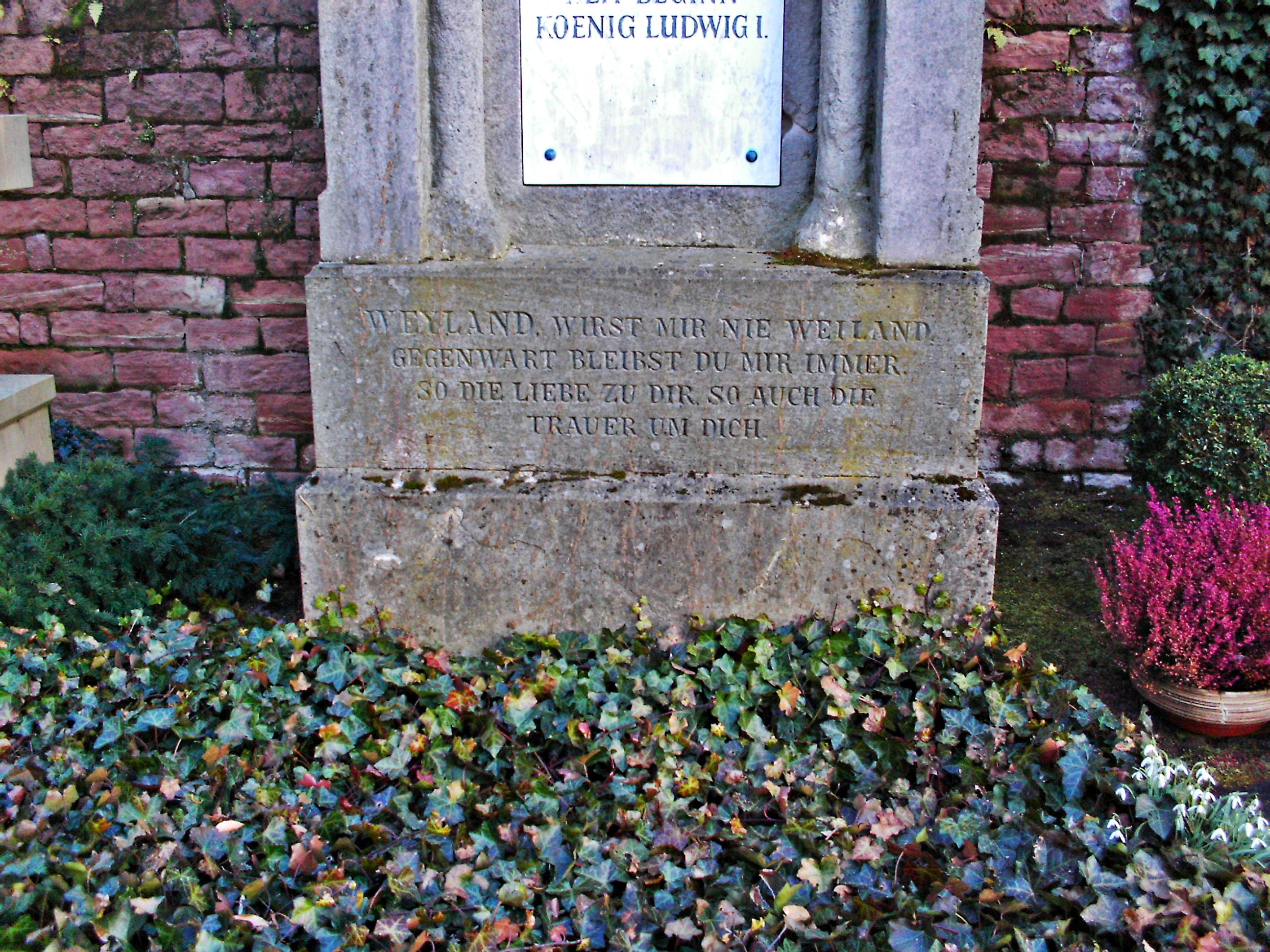 Louise Weyland, Erzieherin von König Ludwig I. von Bayern. Vom König selbst verfasster Grabspruch in Mannheim.